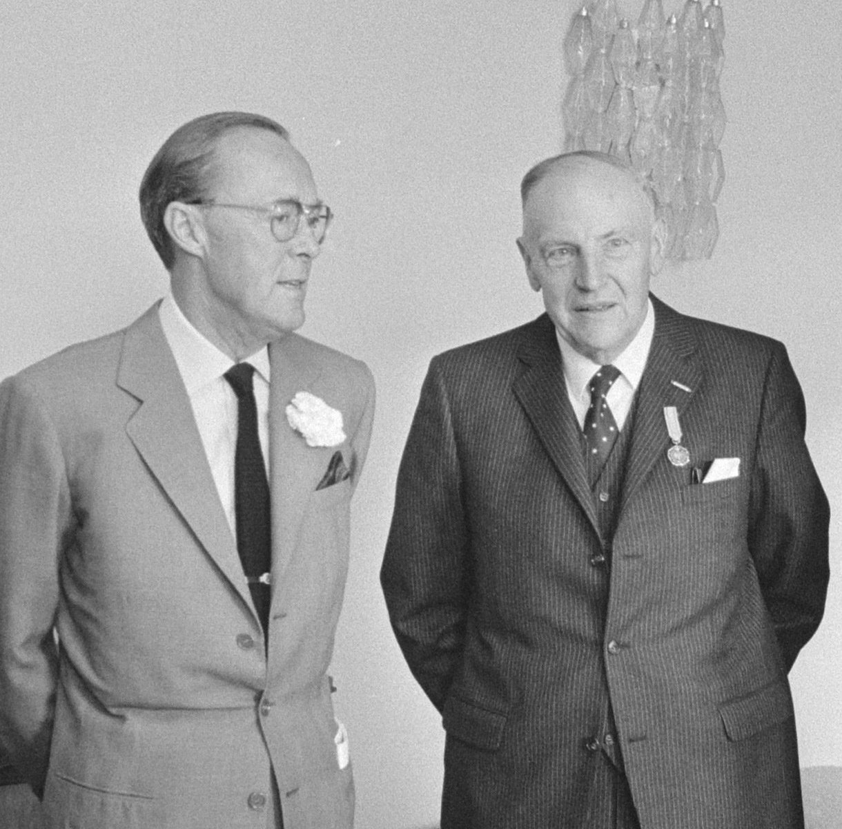 Collectie / Archief : Fotocollectie Anefo Reportage / Serie : Uitreiking door prins Bernhard van de Zilveren Anjers in het Paleis op de Dam te Amsterdam Beschrijving : V.l.n.r. F.C. Wieder, prins Bernhard, J. Posch en C. Hoek Datum : 25 juni 1971 Locatie : Amsterdam, Noord-Holland Trefwoorden : huldigingen, onderscheidingen, prinsen Persoonsnaam : Bernhard (prins Nederland), Hoek, C., Posch, Jacob, Wieger, F.C. Instellingsnaam : Paleis op de Dam, Zilveren Anjer Fotograaf : Fotograaf Onbekend / Anefo, [onbekend] Auteursrechthebbende : Nationaal Archief Materiaalsoort : Negatief (zwart/wit) Nummer archiefinventaris : bekijk toegang 2.24.01.05 Bestanddeelnummer : 924-6769